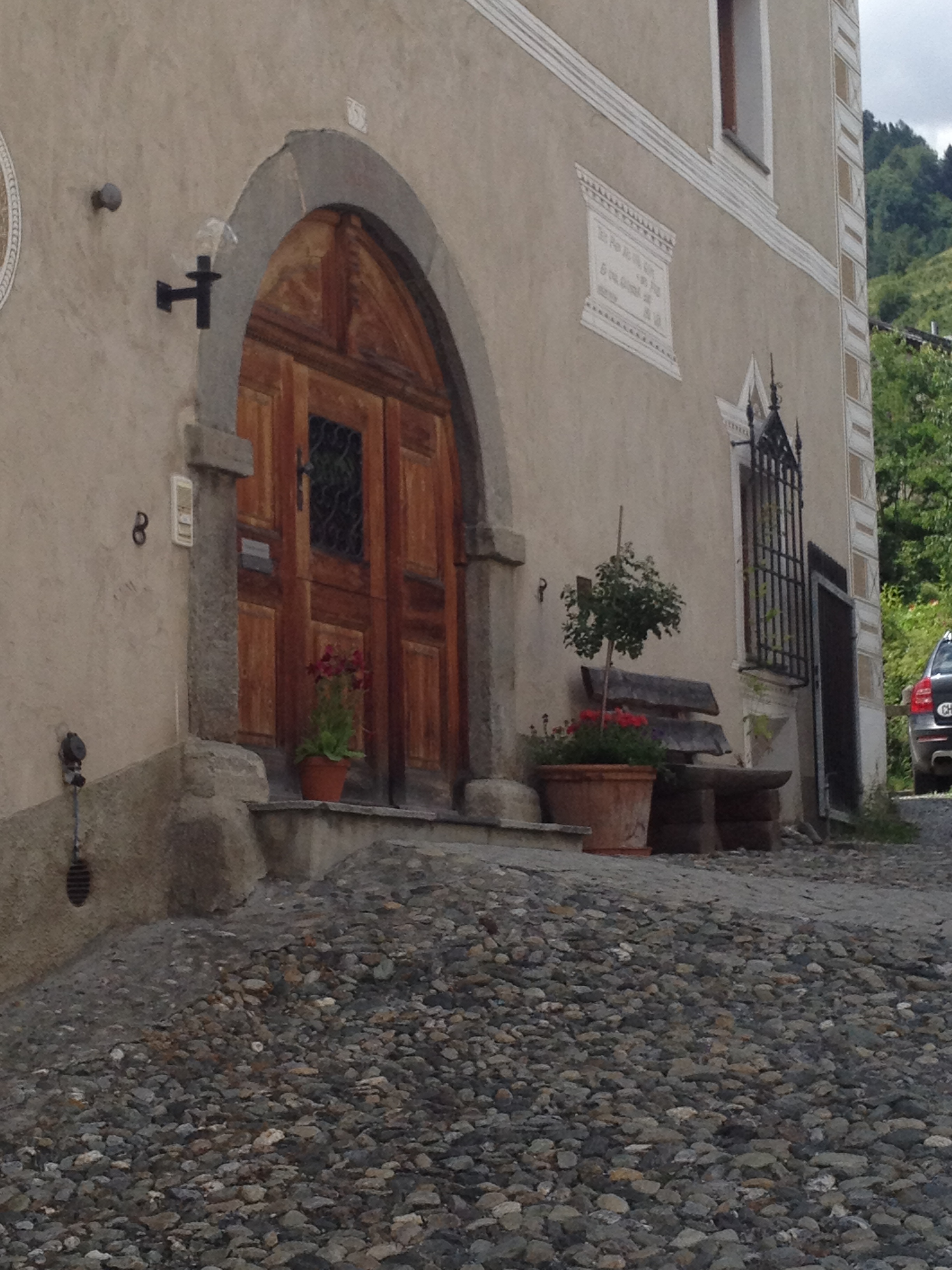 Pfarrhaus in Scuol (Unterengadin), vor dem Portal